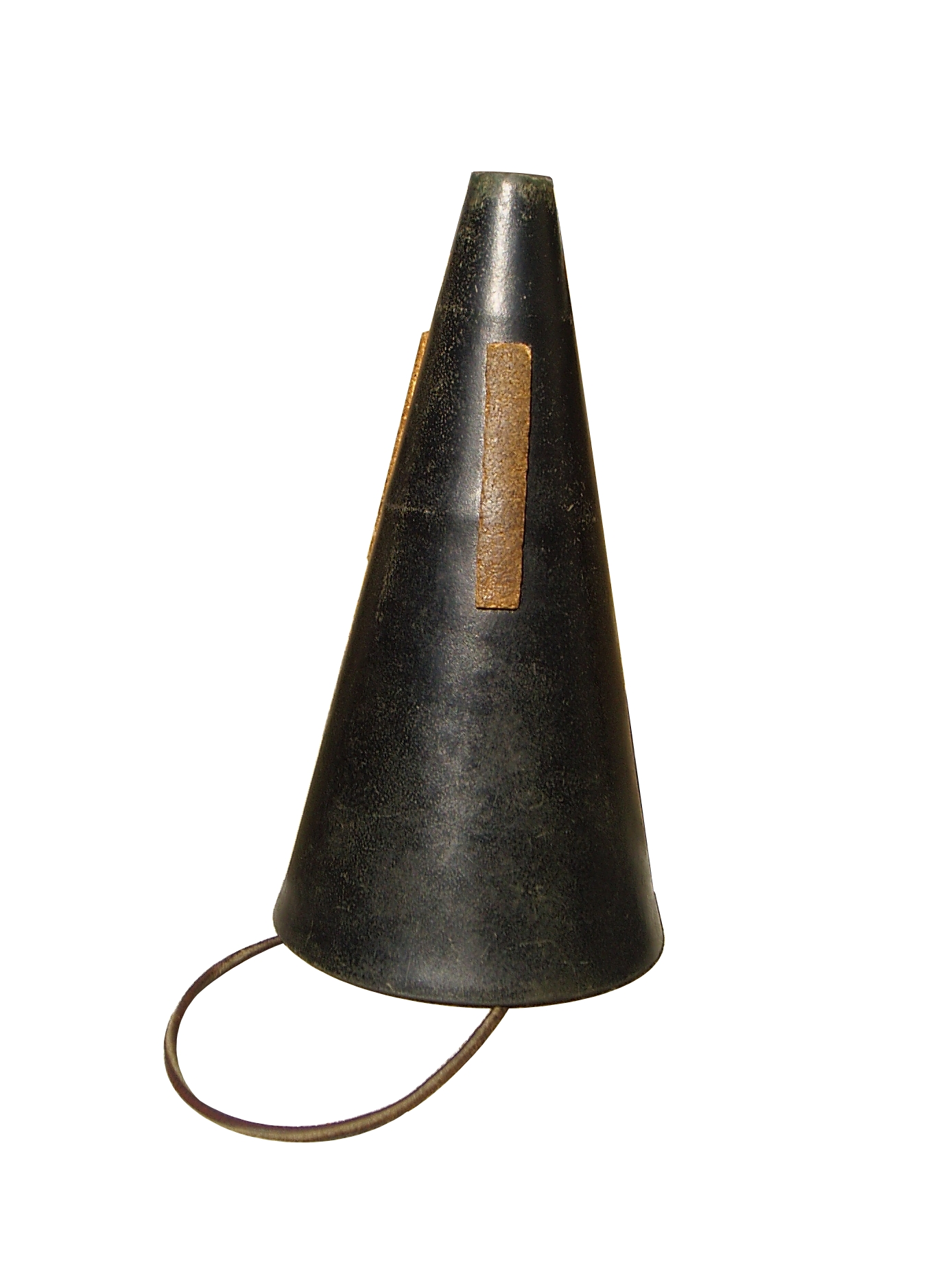 S.W. LEWIS ORCHESTRAL HORNS